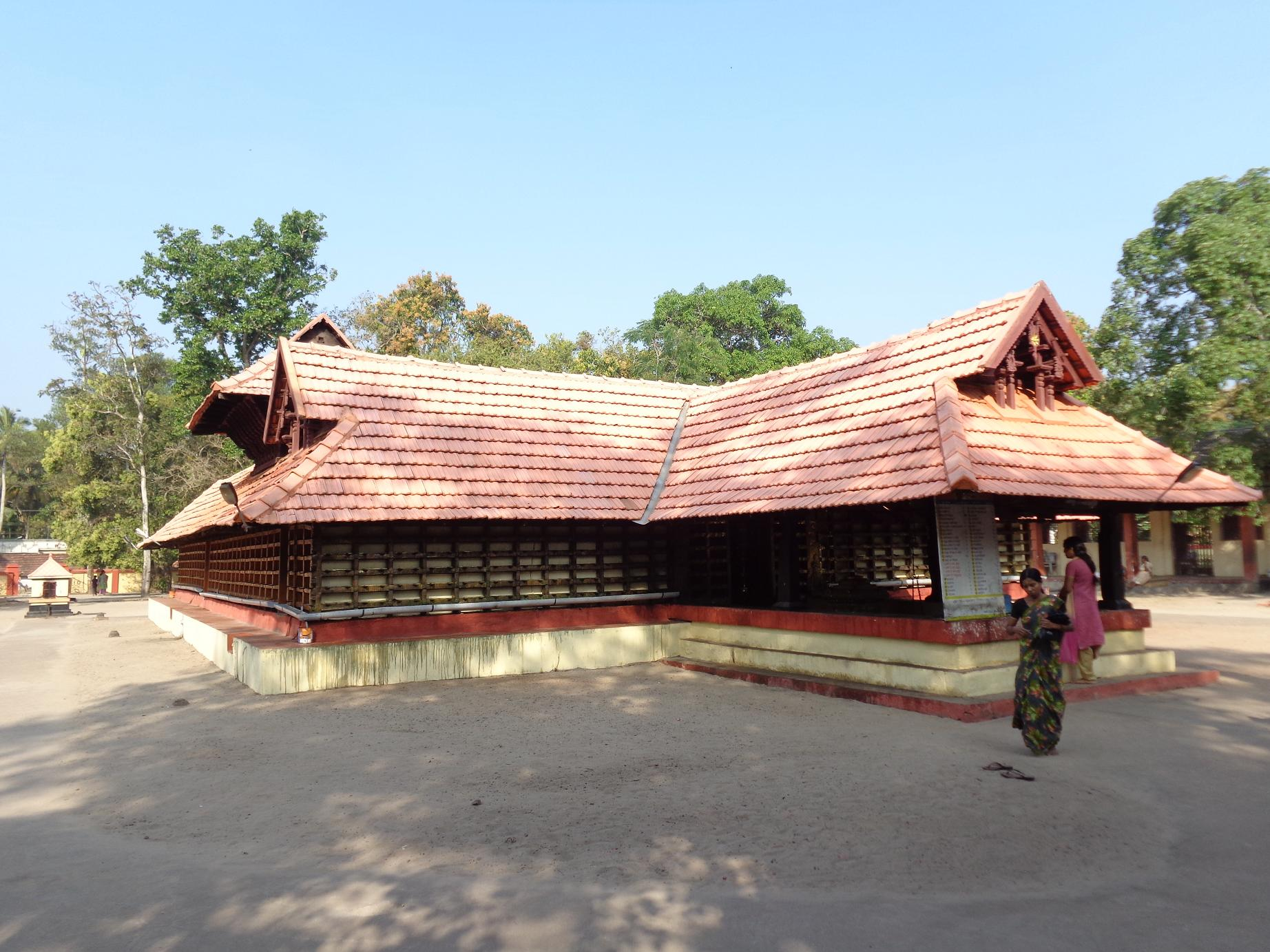 പാണ്ഡവർ കാവ് ക്ഷേത്രം